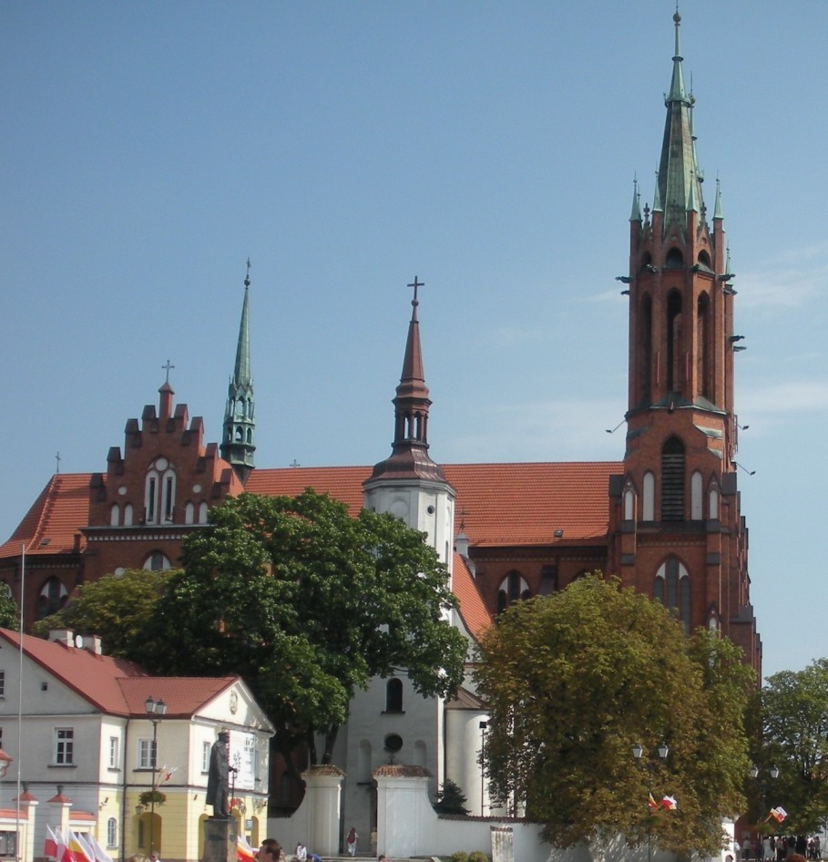 Stary i Nowy Kościół Farny - Zespół bazyliki archikatedralnej Wniebowzięcia NMP w Białymstoku. Po lewej budynek kina Ton i pomnik Józefa Piłsudskiego.